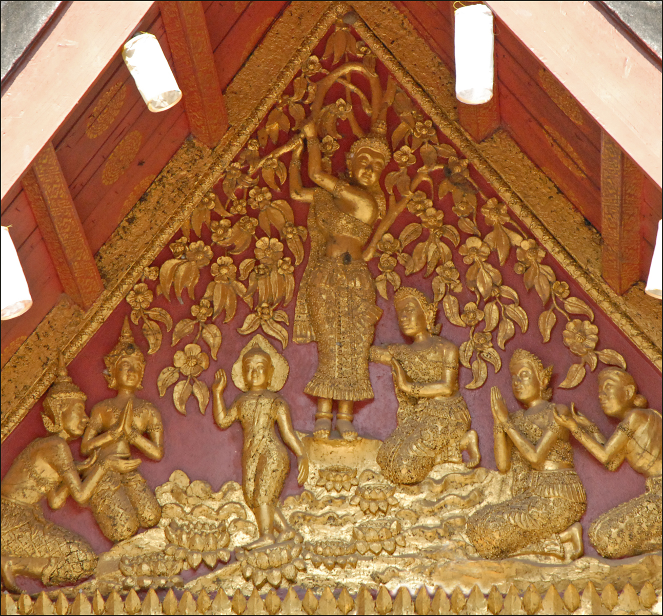 Le tympan sud du portique du Vat Mai est orné d'une scène de la naissance du Prince Siddartha. Le petit Bouddha marche sur les 7 lotus. "Son père, Suddhodona était le roi des Sakya (il ne fut probablement que Raja, soit propriétaire terrien de la caste des guerriers) ayant épousé la reine Maya, fort sage et vertueuse qui demeura chaste jusque dans l’état du mariage. Elle eut un jour un songe : elle vit, sans en ressentir la moindre douleur, un petit éléphant blanc à 6 défenses pénétrer dans son flanc ; la naissance aurait eu lieu 10 mois après le rêve prémonitoire. L’enfant serait né dans un bosquet du parc de Lumbini à l’ombre d’un figuier, et c’est Brahmâ lui-même qui aurait accueilli l’enfant déjà tout rempli de science et du souvenir de ses existences antérieures. La légende dit qu’à ce moment précis toute la nature exulta en prodiges extraordinaires : les fleurs en boutons s’ouvrirent spontanément, et de divines musiques résonnèrent à toutes les oreilles... L’enfant se leva alors, regarda autour de lui puis fit 7 pas en direction des 4 points cardinaux, atteignant ainsi le sommet du monde. Le sage Asita, du fond de sa retraite himalayenne, eut la prescience de cet événement extraordinaire, et vint s’incliner devant l’enfant qui porte sur son corps les 32 marques de sa gloire à venir : son crâne présentait une excroissance, un front large et uni entre ses deux sourcils, des lobes d’oreille 3 fois plus longs que d’accoutumée, sous la plante des pieds tracée une roue aux mille rais..." extrait du site